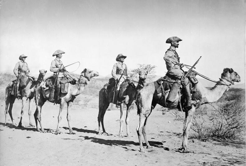 Kamelreiterpatrouille